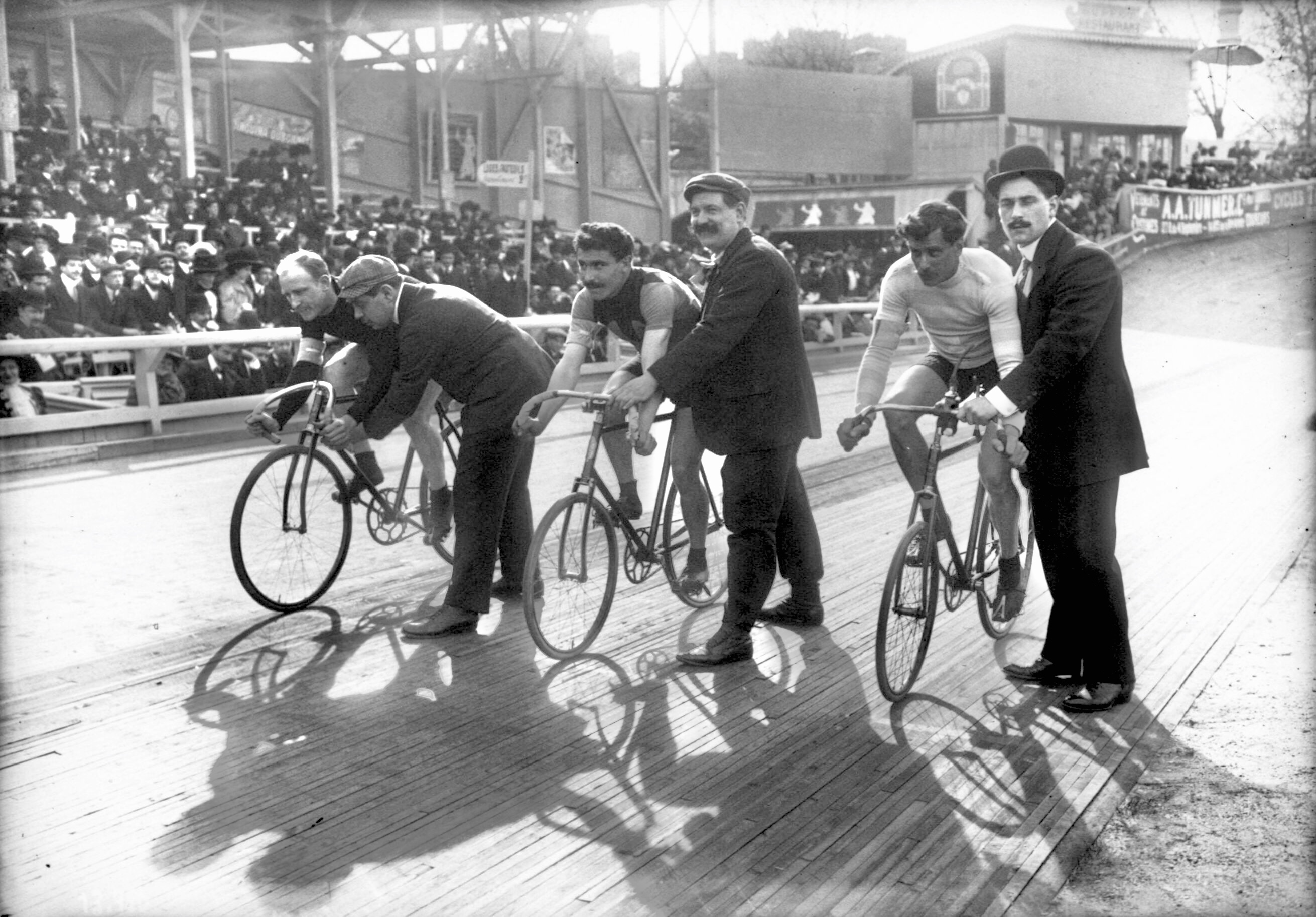 Buffalo, 25 avril 09, départ de la course de 100 km : Bouhours, Lapize, Seigneur.